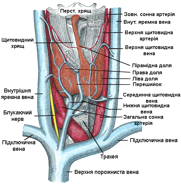 Схеметичне зображення щитоподібної залози.